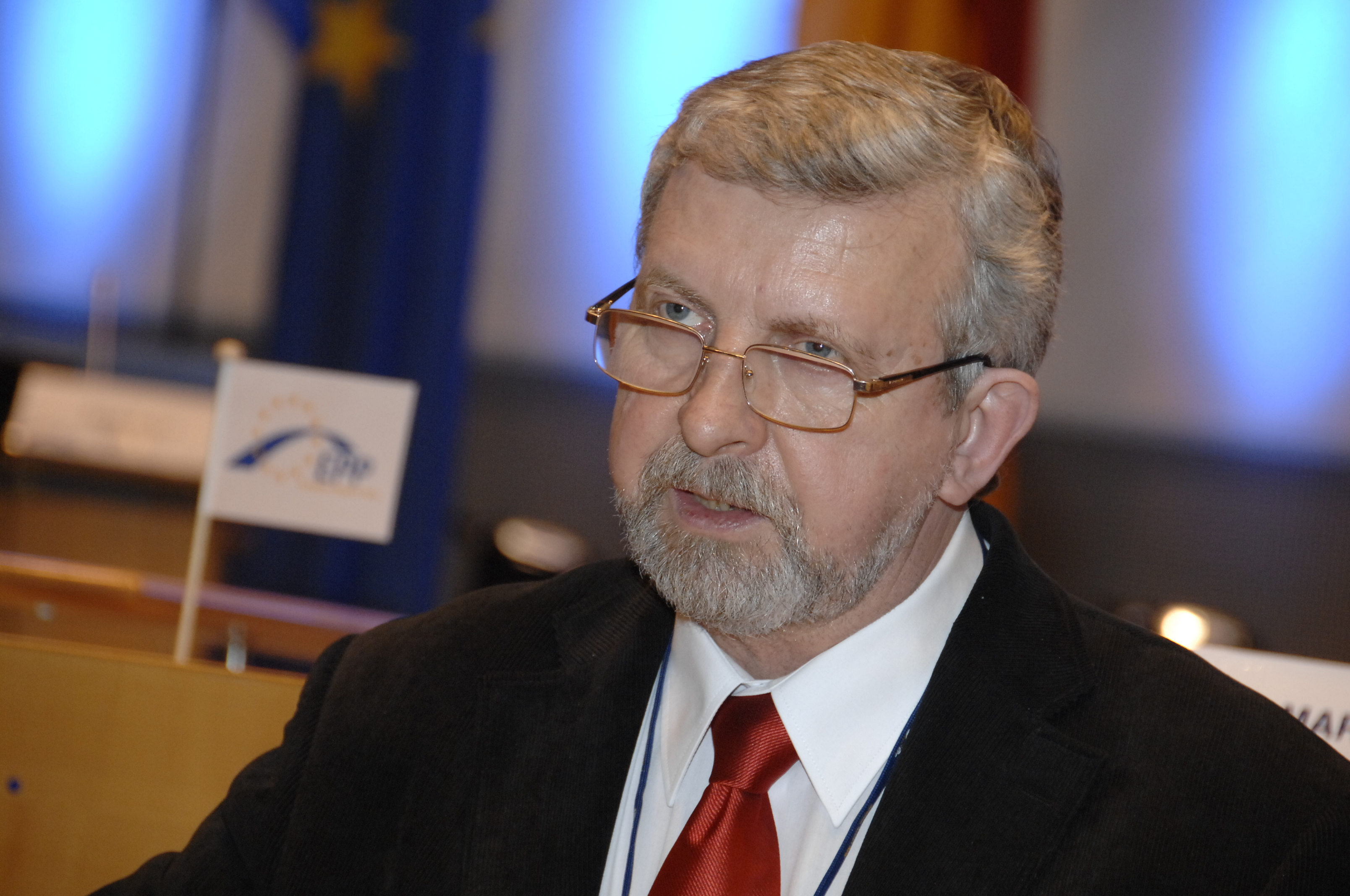 Aleksandar Milinkevich during EPP Congress in Bonn